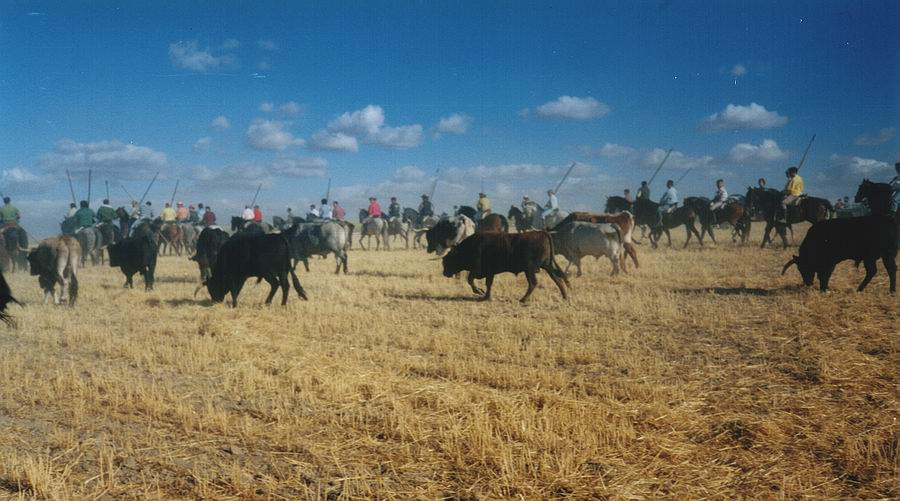 Recorrido por el campo Encierros de Medina del Campo